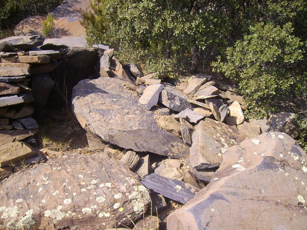 Girarols II